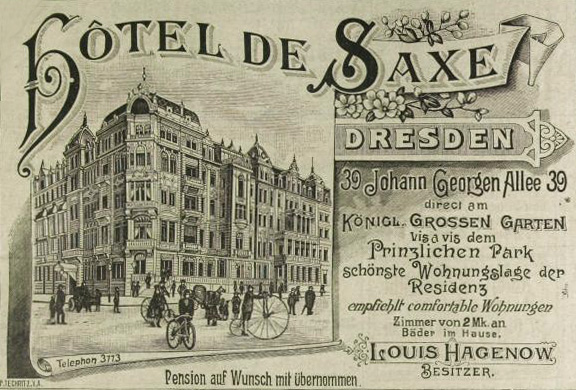 Hotel de Saxe, Johann-Georgen-Allee (heute: Lingnerallee) Dresden Anzeige 1893 in Industrie des Erzgebirges und Vogtlandes, Nr. 14, 1893